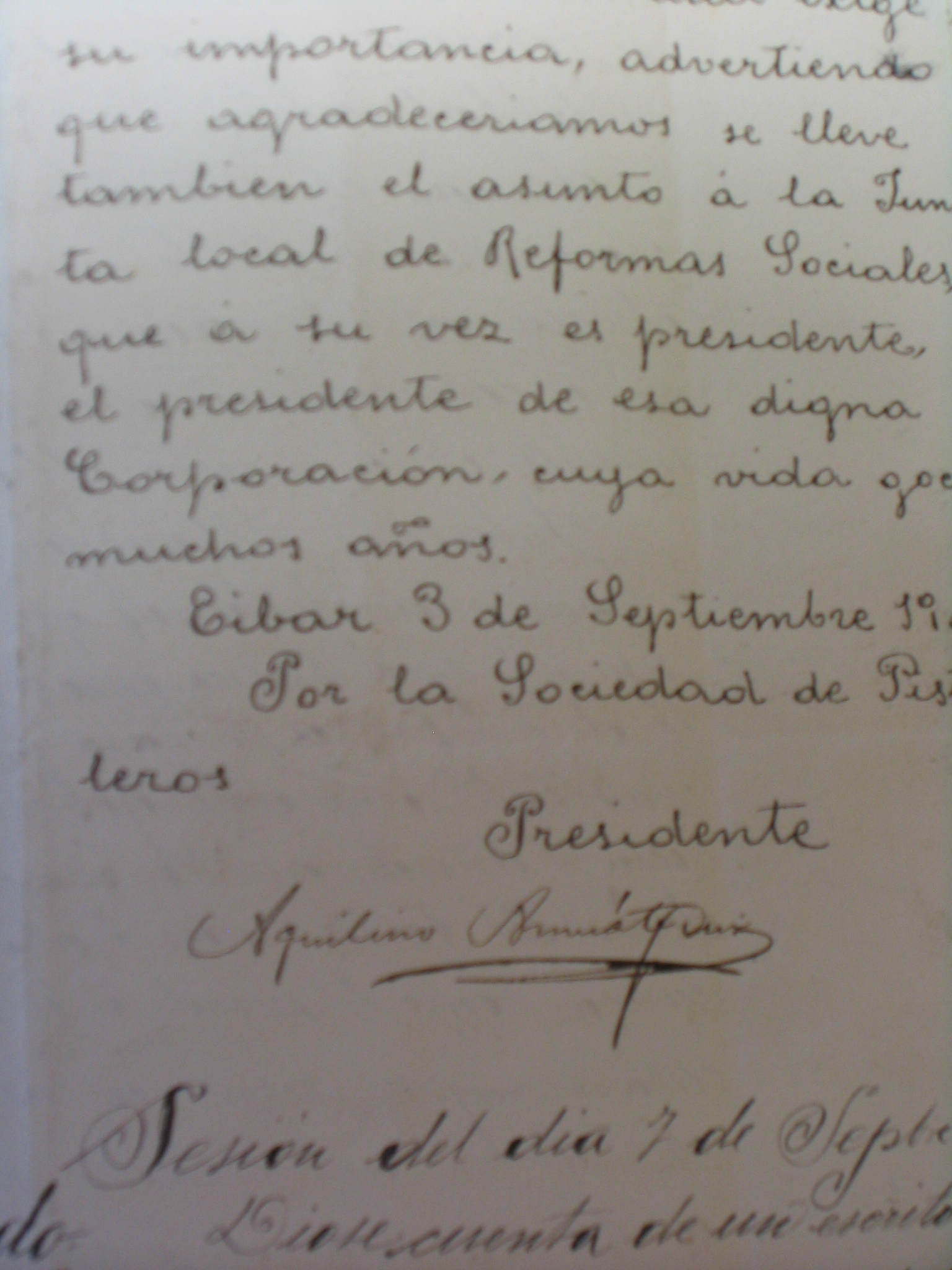 Documento firmado por Aquilino Amuategui como presidente de la Sociedad de Obreros Pistoleros de Eibar.